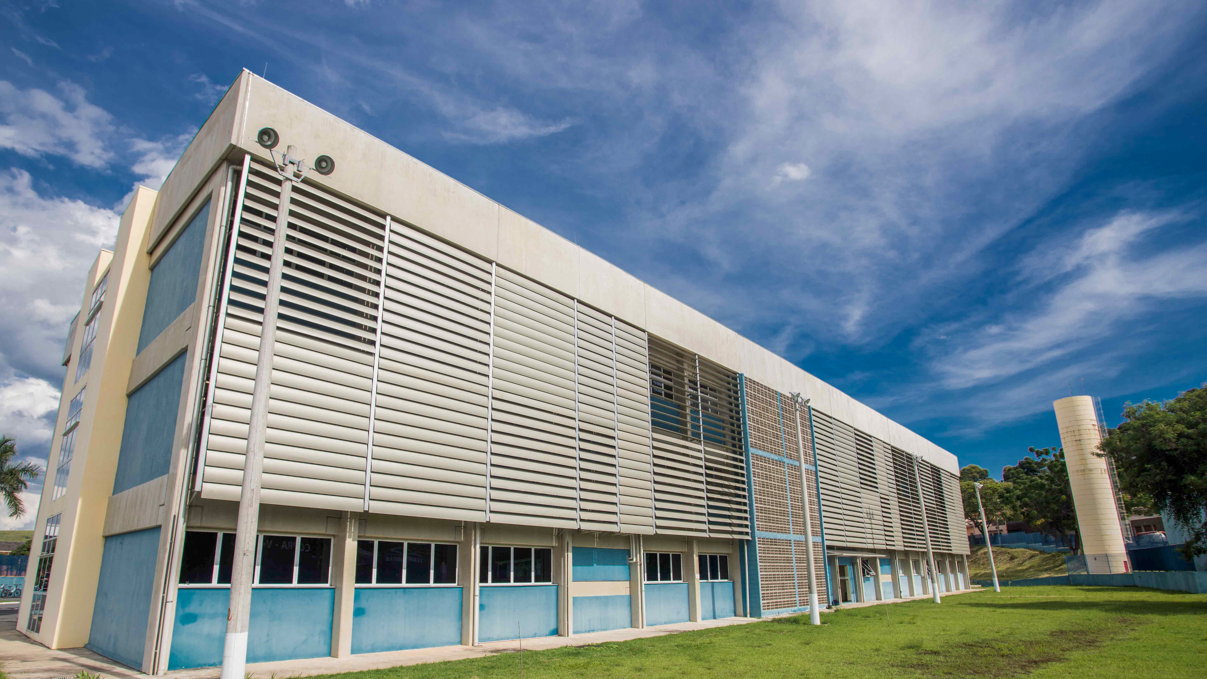 O Governador do Estado de São Paulo, Geraldo Alckmin participou da Entrega de 600 unidades habitacionais + Descerramento de placa da FATEC de Cruzeiro. Local: Cruzeiro/SP Data: 22/02/2018 Foto: Governo do Estado de São Paulo